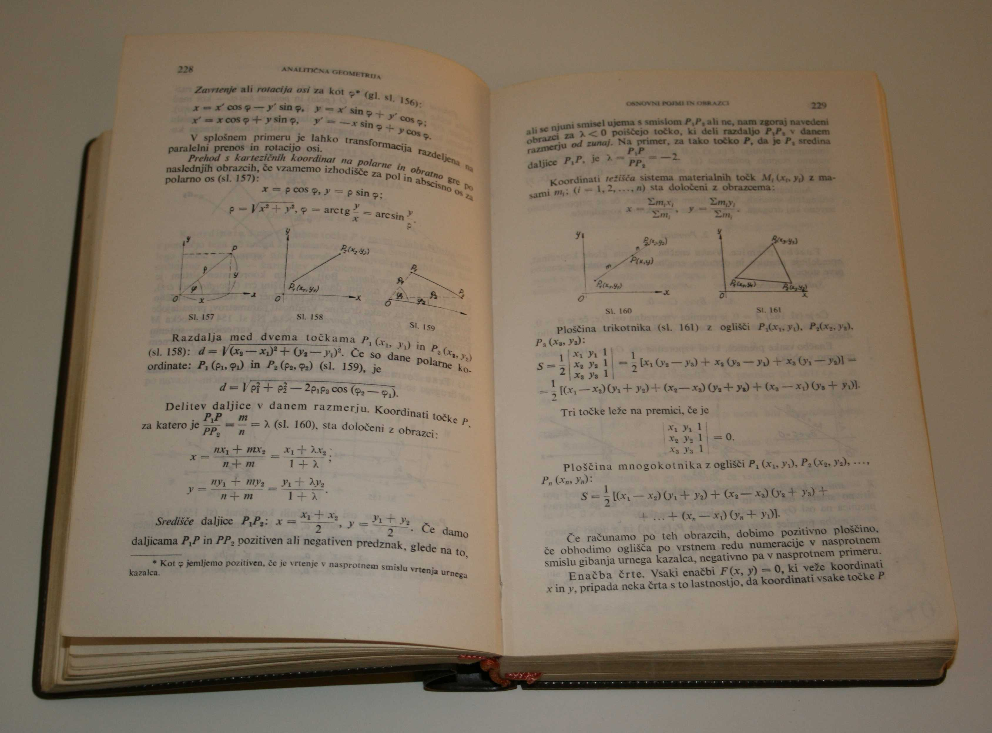 Bronštejn, Semendjajev, Matematični priročnik, Tehniška založba, Ljubljana 1975, 4. ponatis